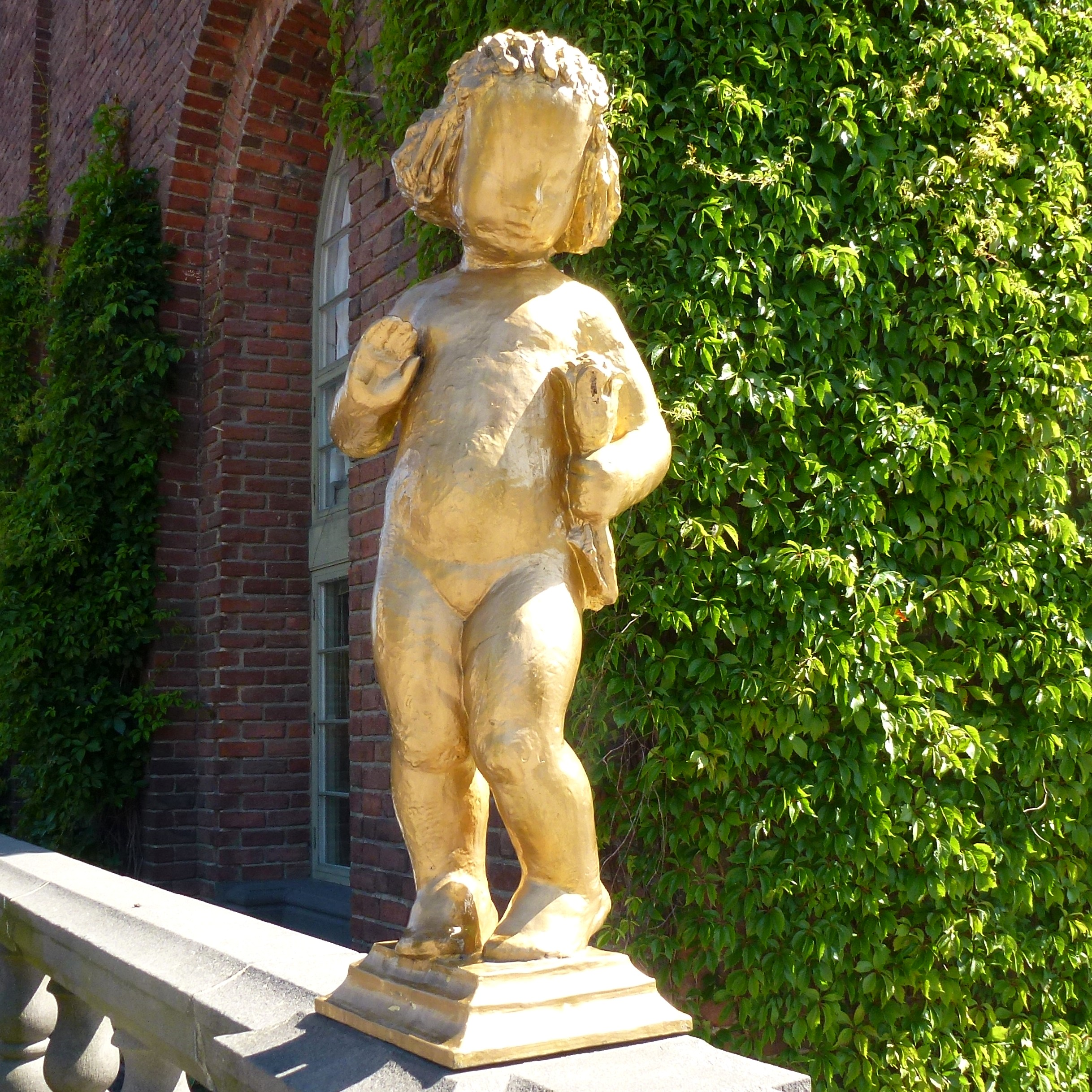 Stadshuset Morgonrodnad